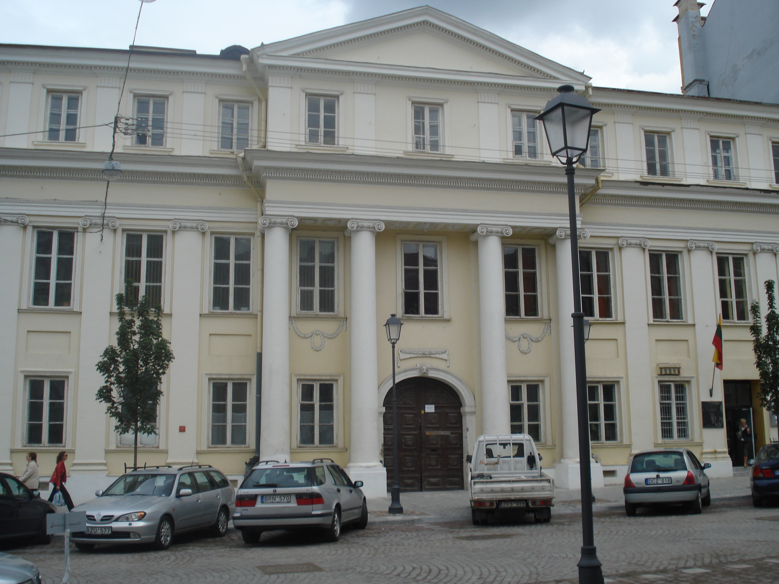 Abramowicz Palace in Vilnius (Vilnius J. Tallat-Kelpša Conservatoire; Didžioji g. 36). Main fasade